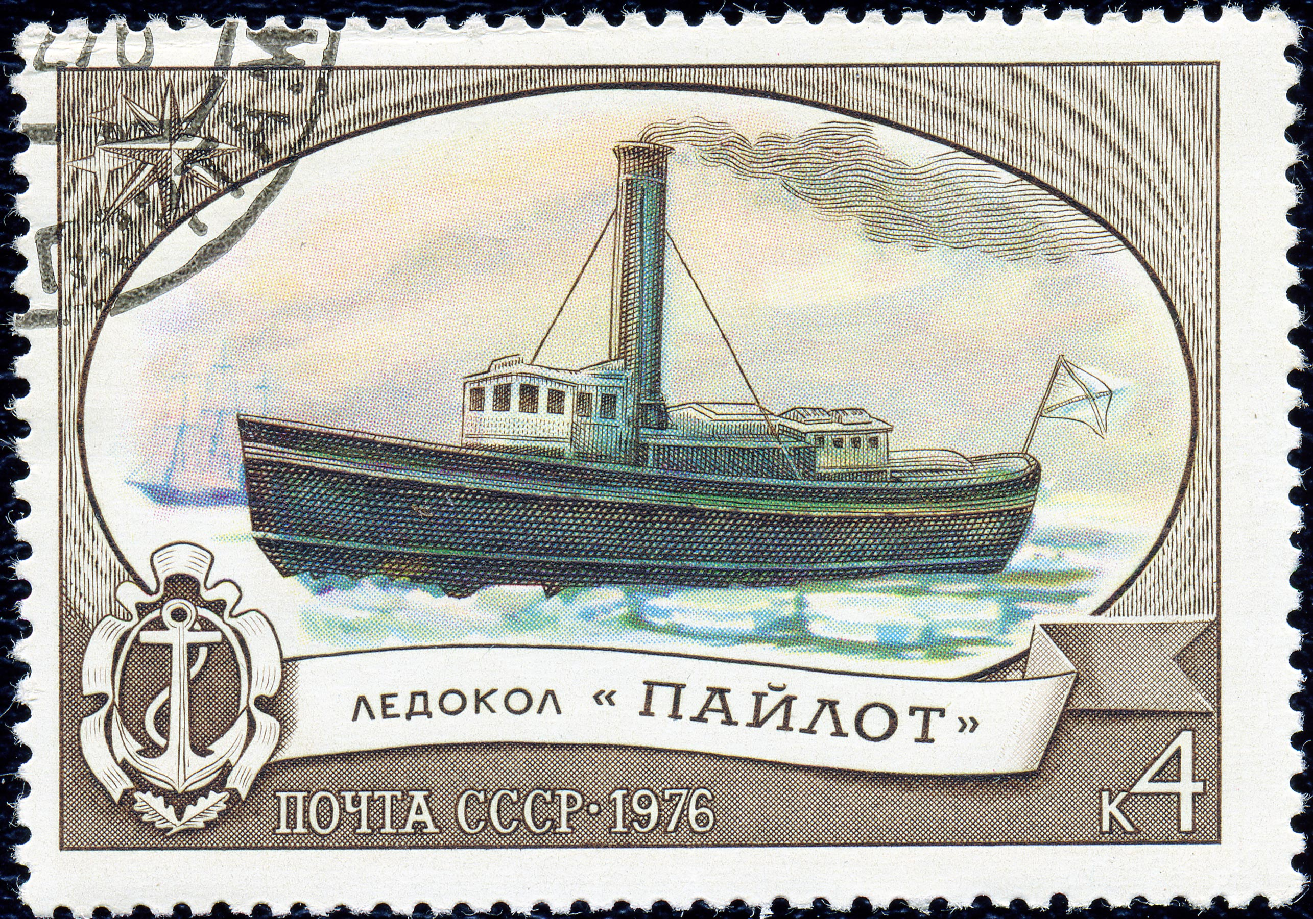 Почтовая марка СССР. 1976. Ледокол Пайлот